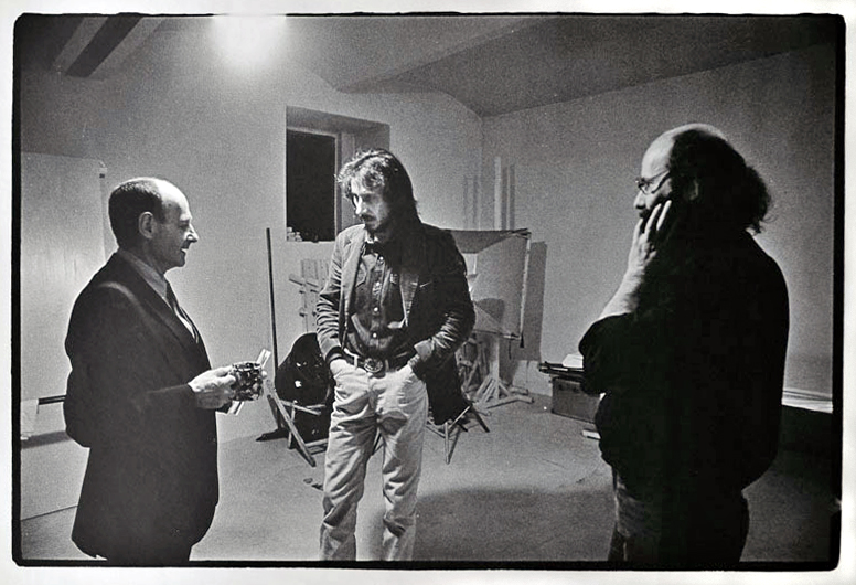 Photograph from Jiří Poláček´s archive.